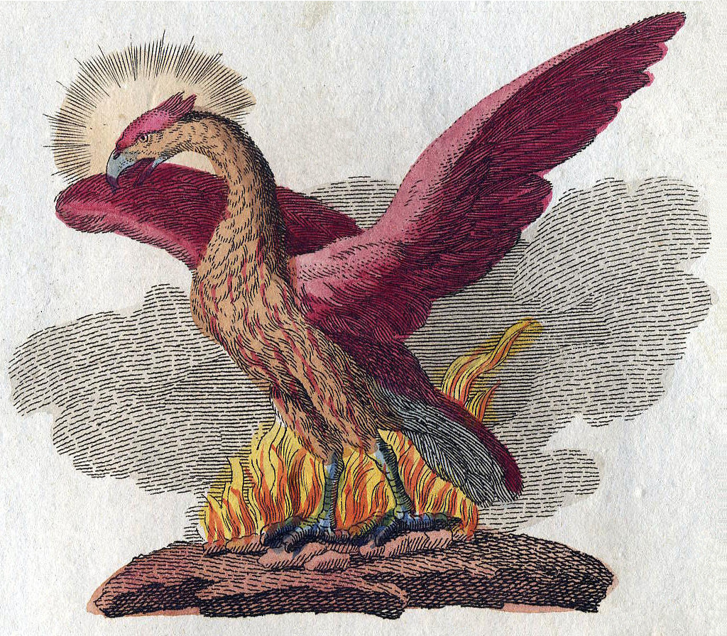 Friedrich Justin Bertuch, Bilderbuch für Kinder, 1790–1830 (Eigenbesitz), Fabelwesen.